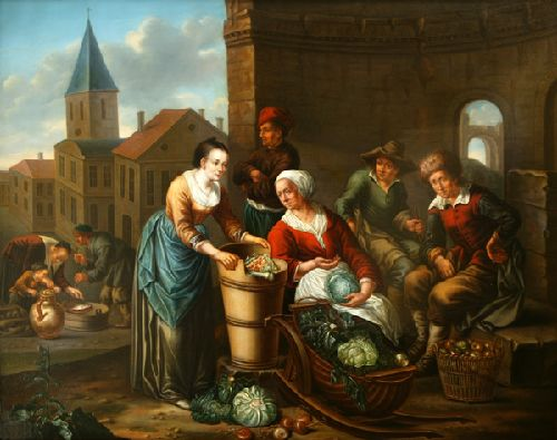 Marktszene